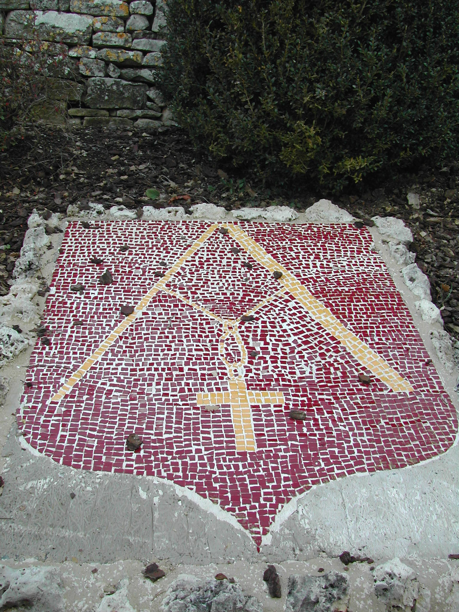 Blason du village d'Aubenas les Alpes